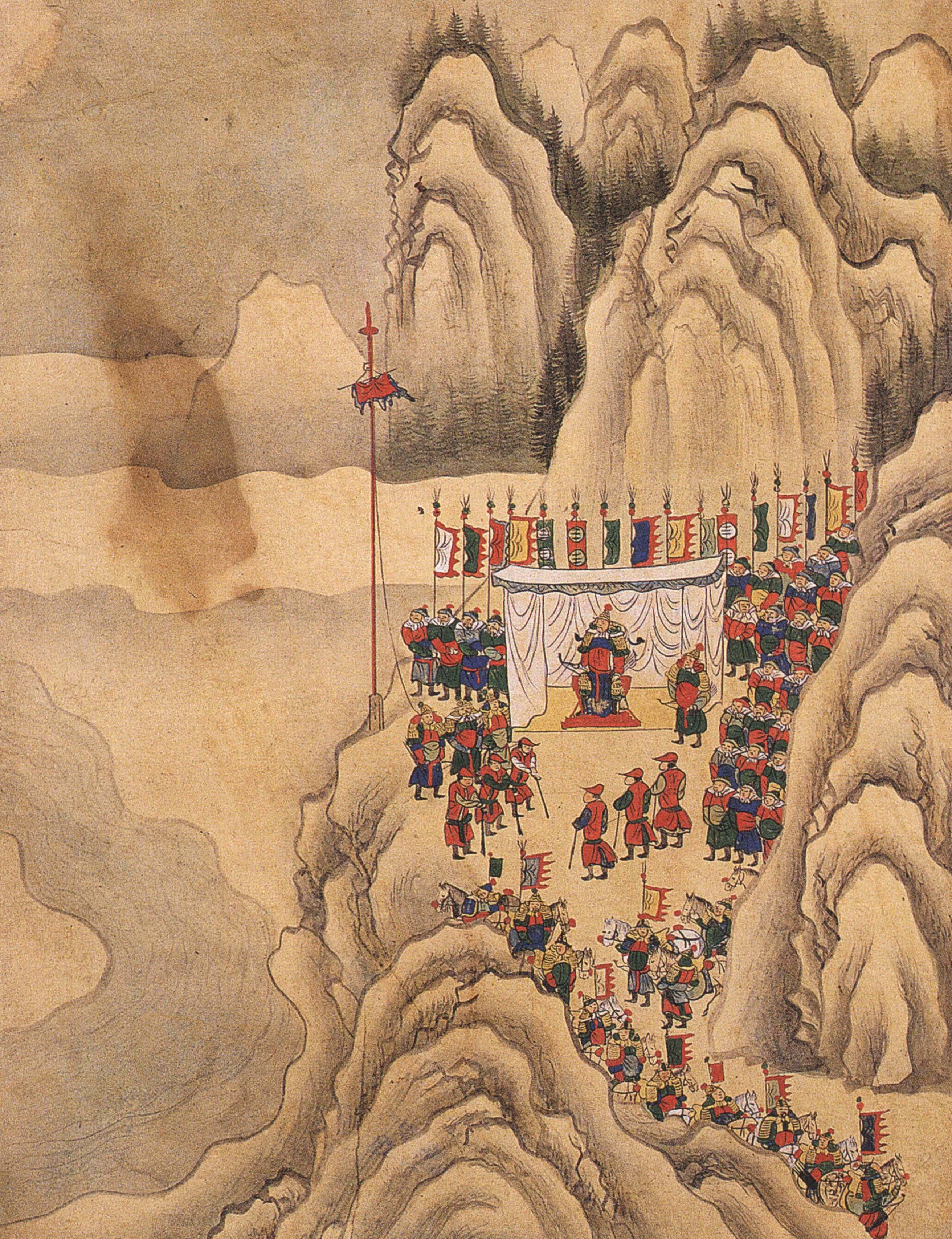 북관유적도첩(北關遺蹟圖帖)-등림영회도(登臨詠懷圖)